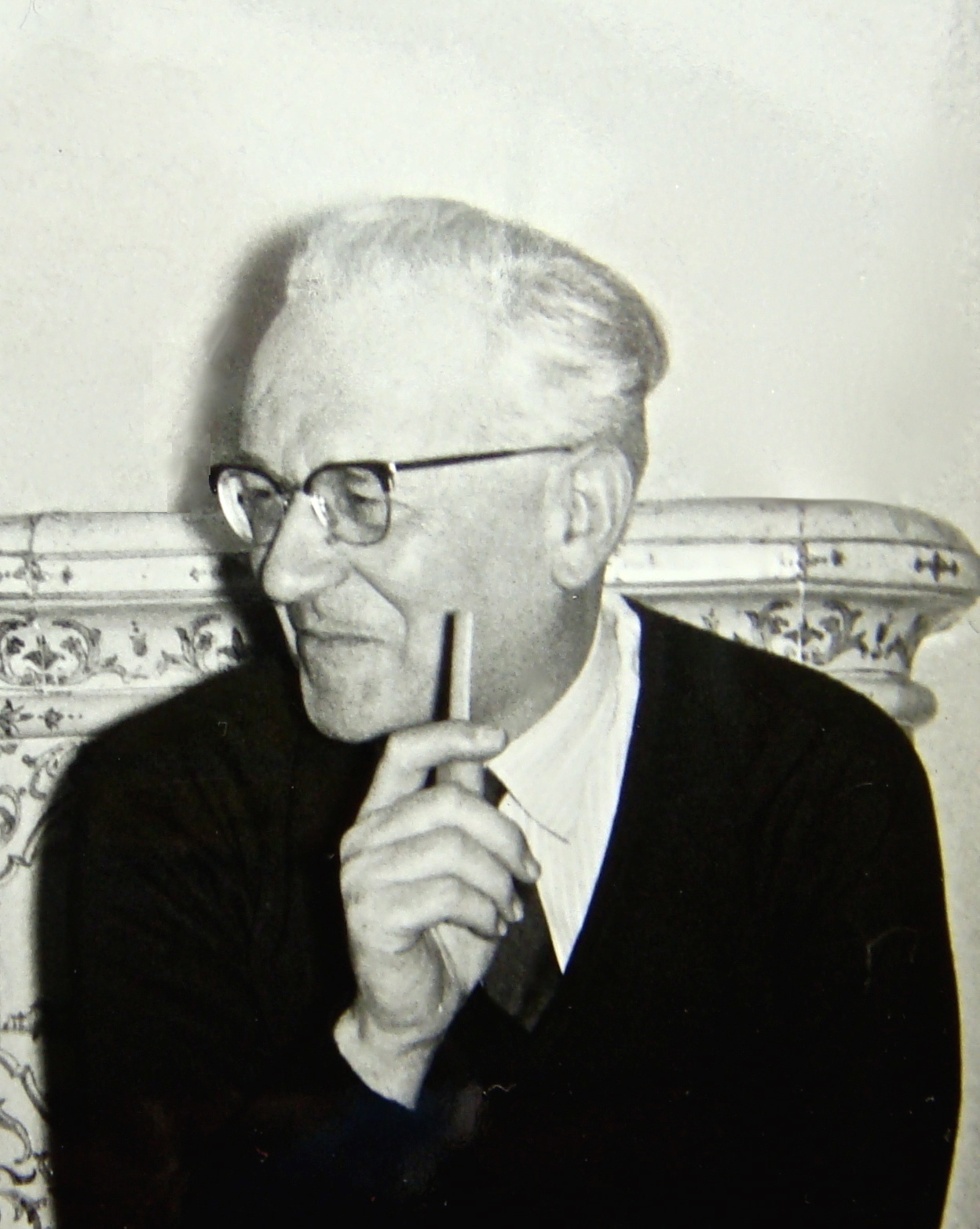 Karl Grenacher, Schweizer Musikpädagoge, Chorleiter und international tätiger Pianist